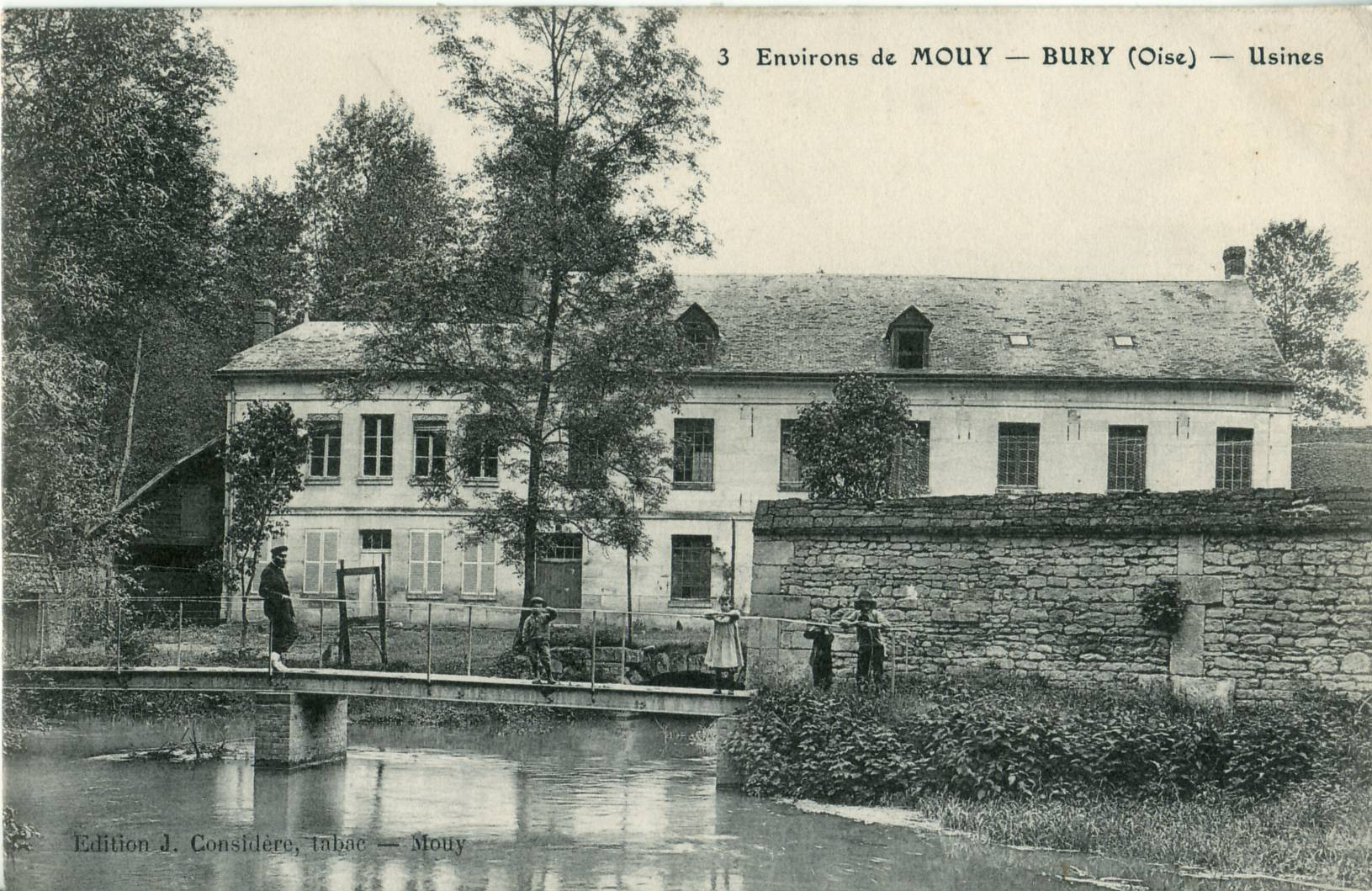 Carte postale éditée par J. Considère, tabac à Mouy, collection Environs de Mouy, n°3 : BURY - Usines